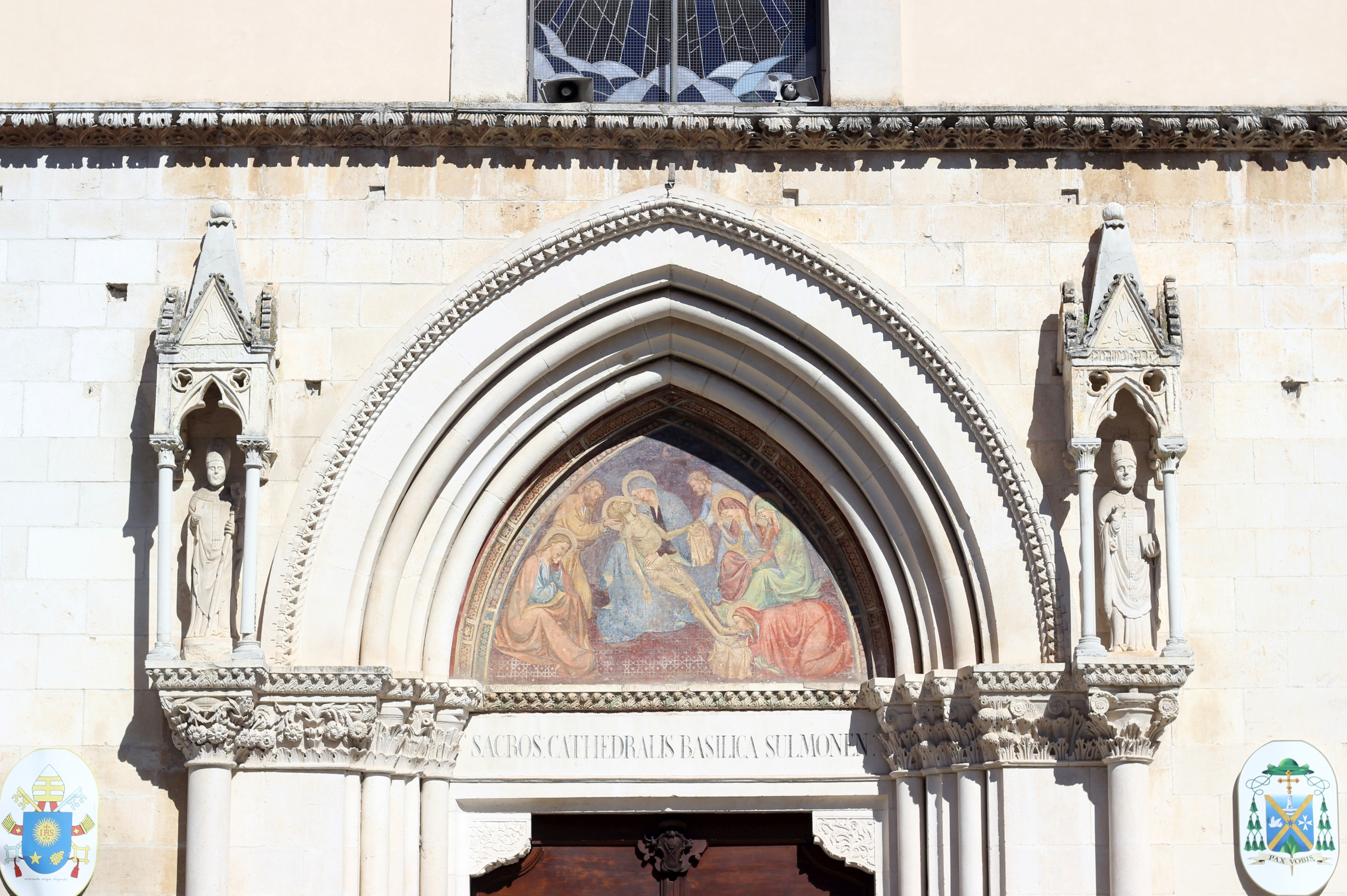 Hauptportal von San Panfilo in Sulmona